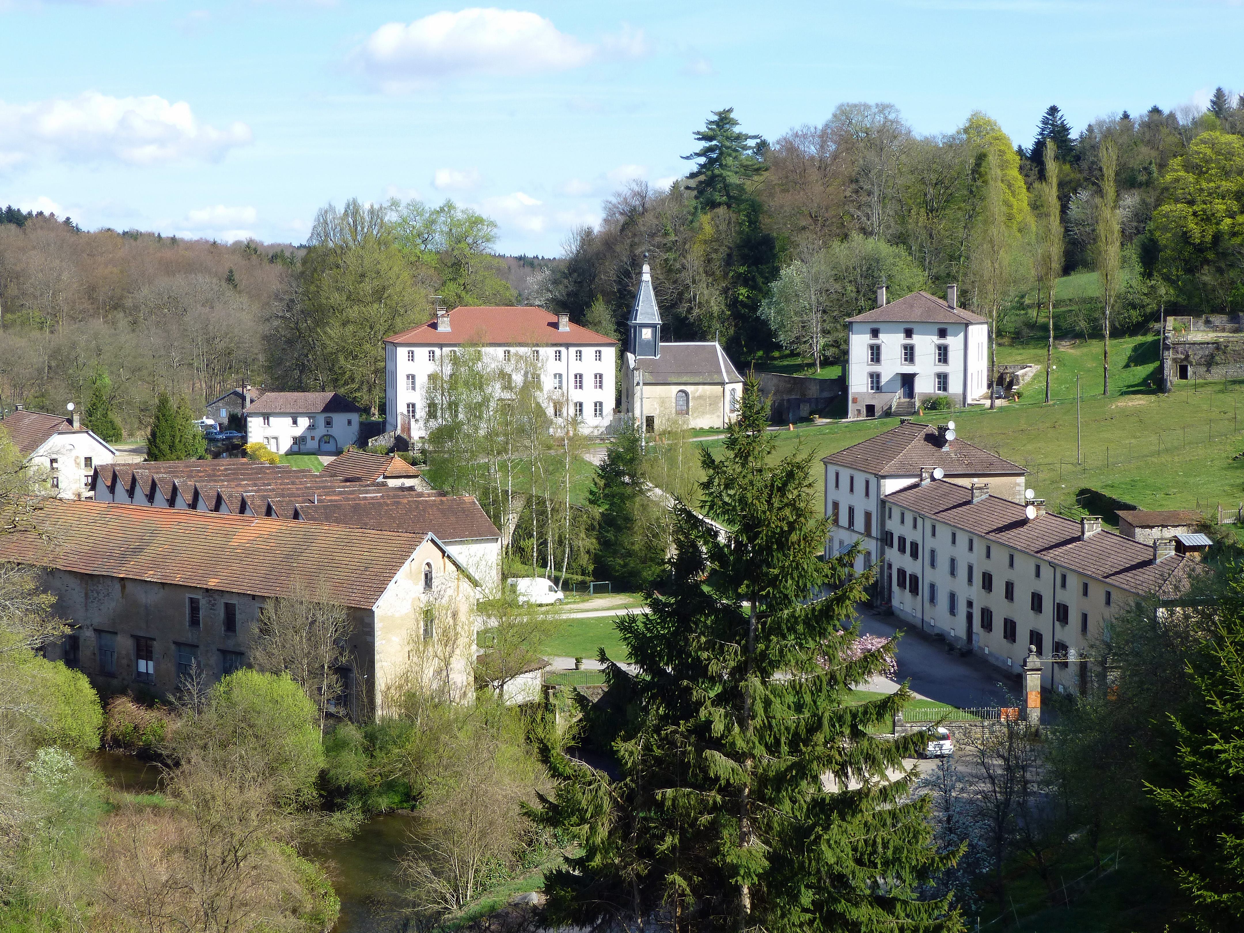 Bains-les-Bains (Vosges) : vue générale de la Manufacture royale